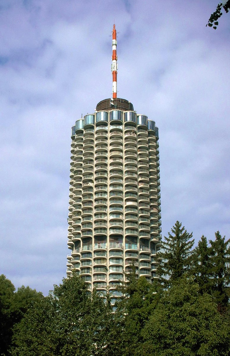 Der Augsburger "Maiskolben" (Hotelturm von Dorint-Novotel), Bayern, Deutschland